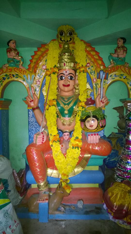 మా పినపళ్ళ గ్రామదేవత గోల్లాలమ్మ